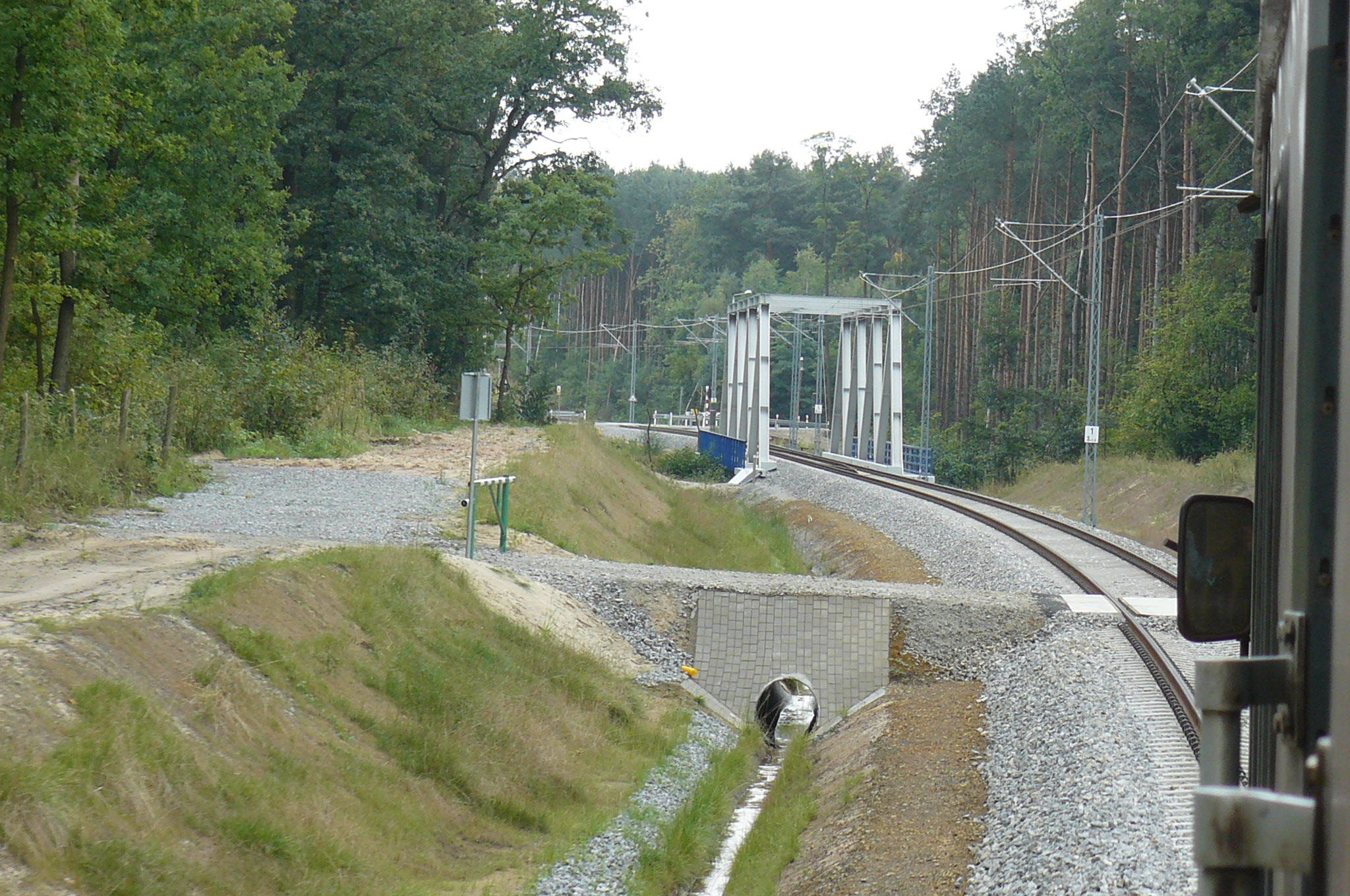 Kolejowa obwodnica Czerwieńsaka.